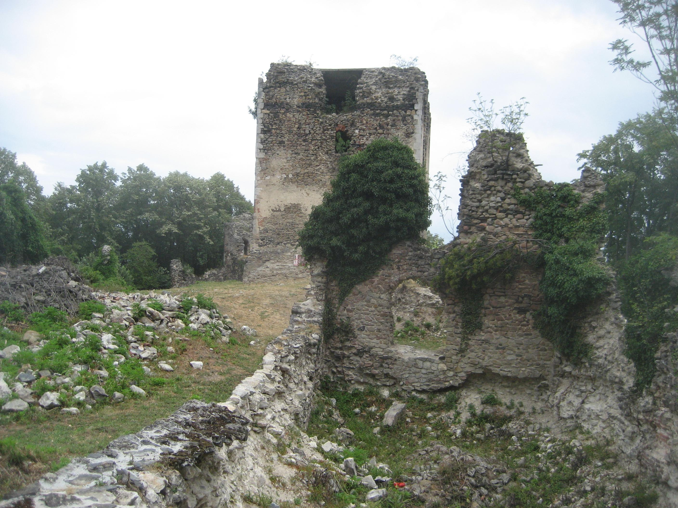 ruins of Garic Grad, northern Croatia Garić grad, Hrvatska